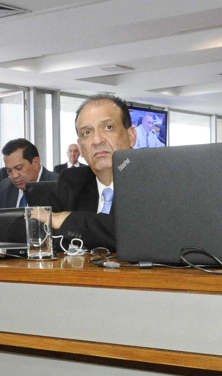 Comissão Mista da Medida Provisória (CMMPV) realiza reunião MP 817/2018 de transposição de servidores dos ex-territórios: reunião para apreciação de relatório. Bancada: senadora Ângela Portela (PDT-RR); senador Randolfe Rodrigues (Rede-AP); deputado Zé Carlos (PT-MA); senador Telmário Mota (PTB-RR); deputado Nilton Capixaba (PTB-RO); senador Hélio José (Pros-DF). Foto: Waldemir Barreto/Agência Senado